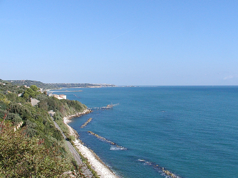 Bilder aus Pescara